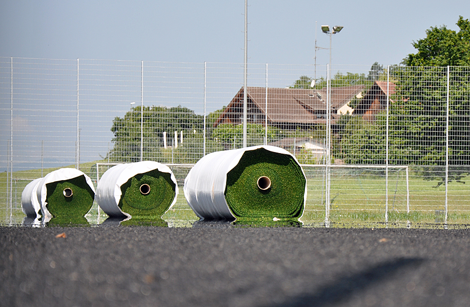 Kunstrasen-Rollen, bereits zum Auslegen